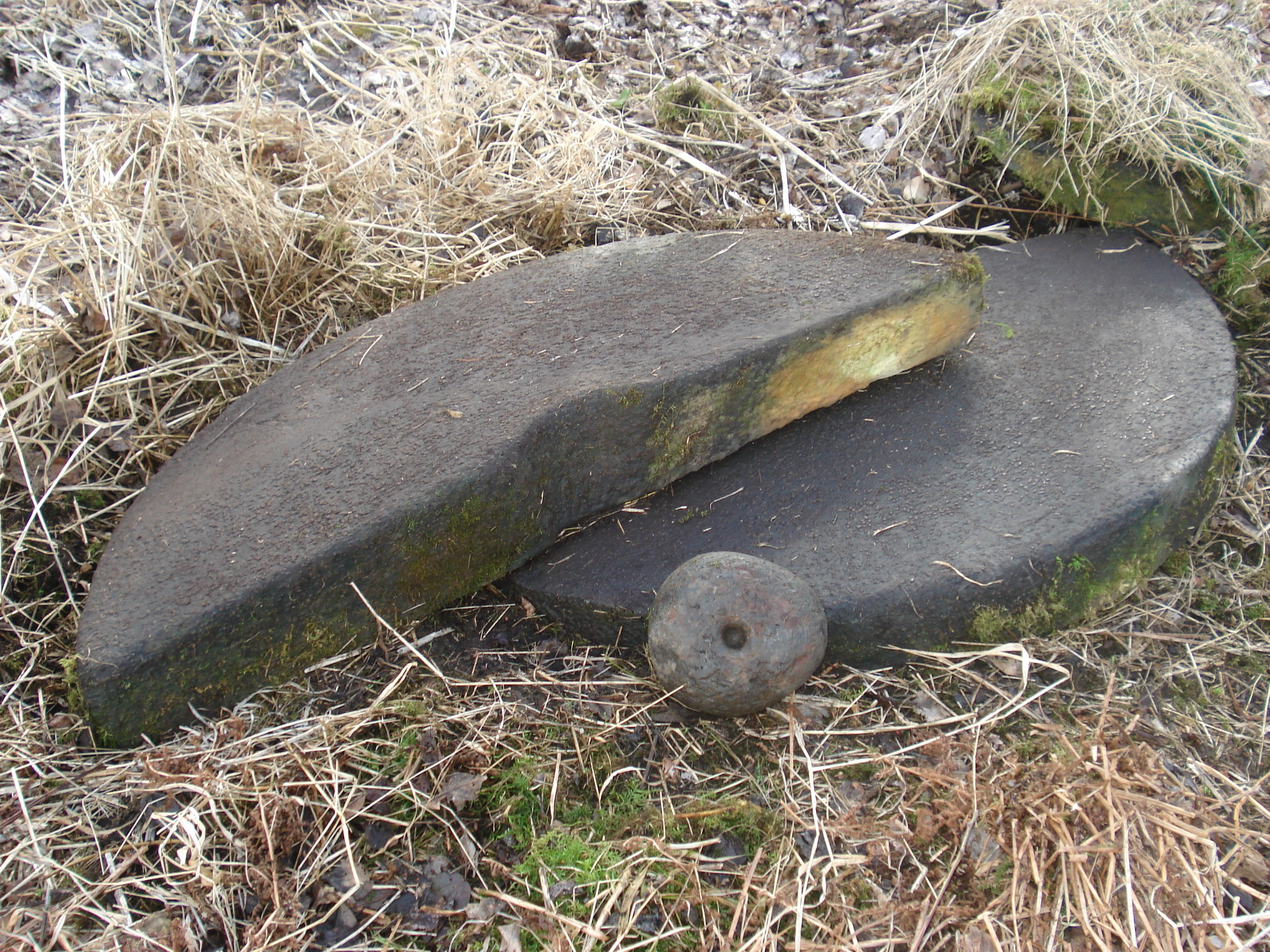 Kvernsteiner fra Staur